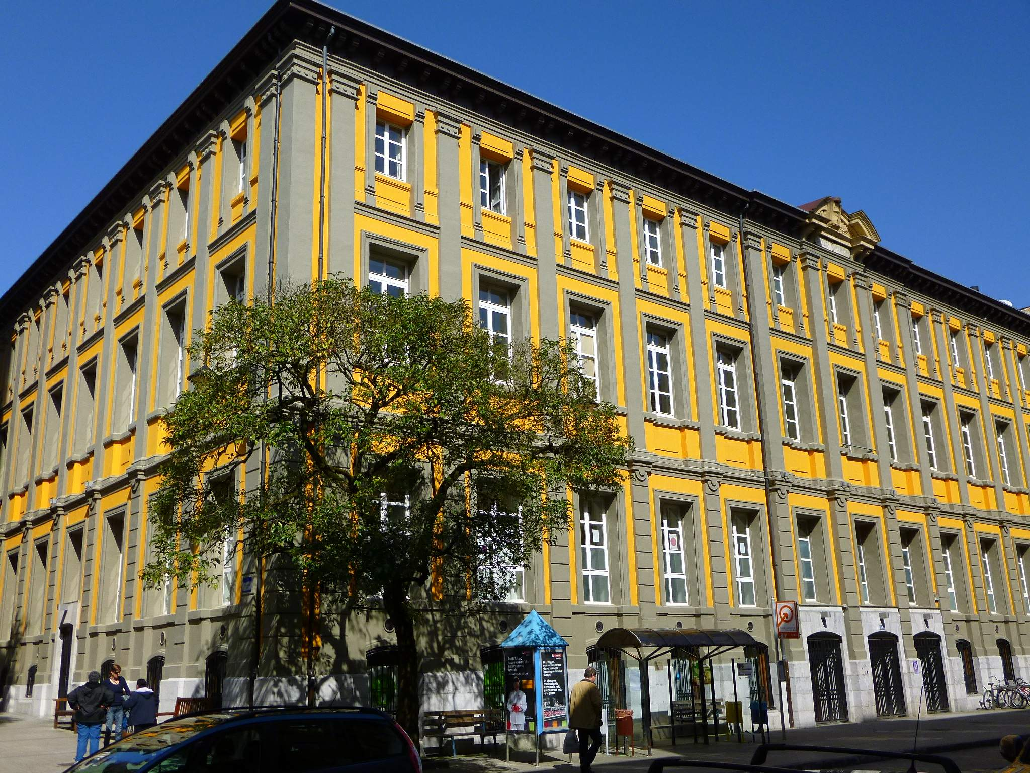 Escuelas Municipales de Tolosa